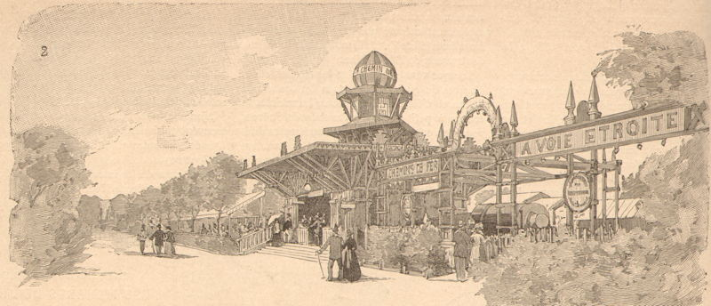 Chemin de Fer-Tramway Decauville de l'Exposition Universelle Paris 1889